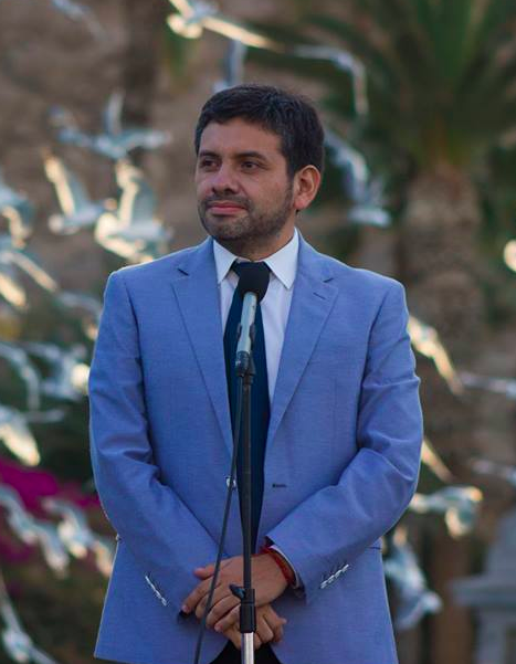 Asume como alcalde de Arica Gerardo Espíndola. Foto cedida al alcalde por Andres Borie.